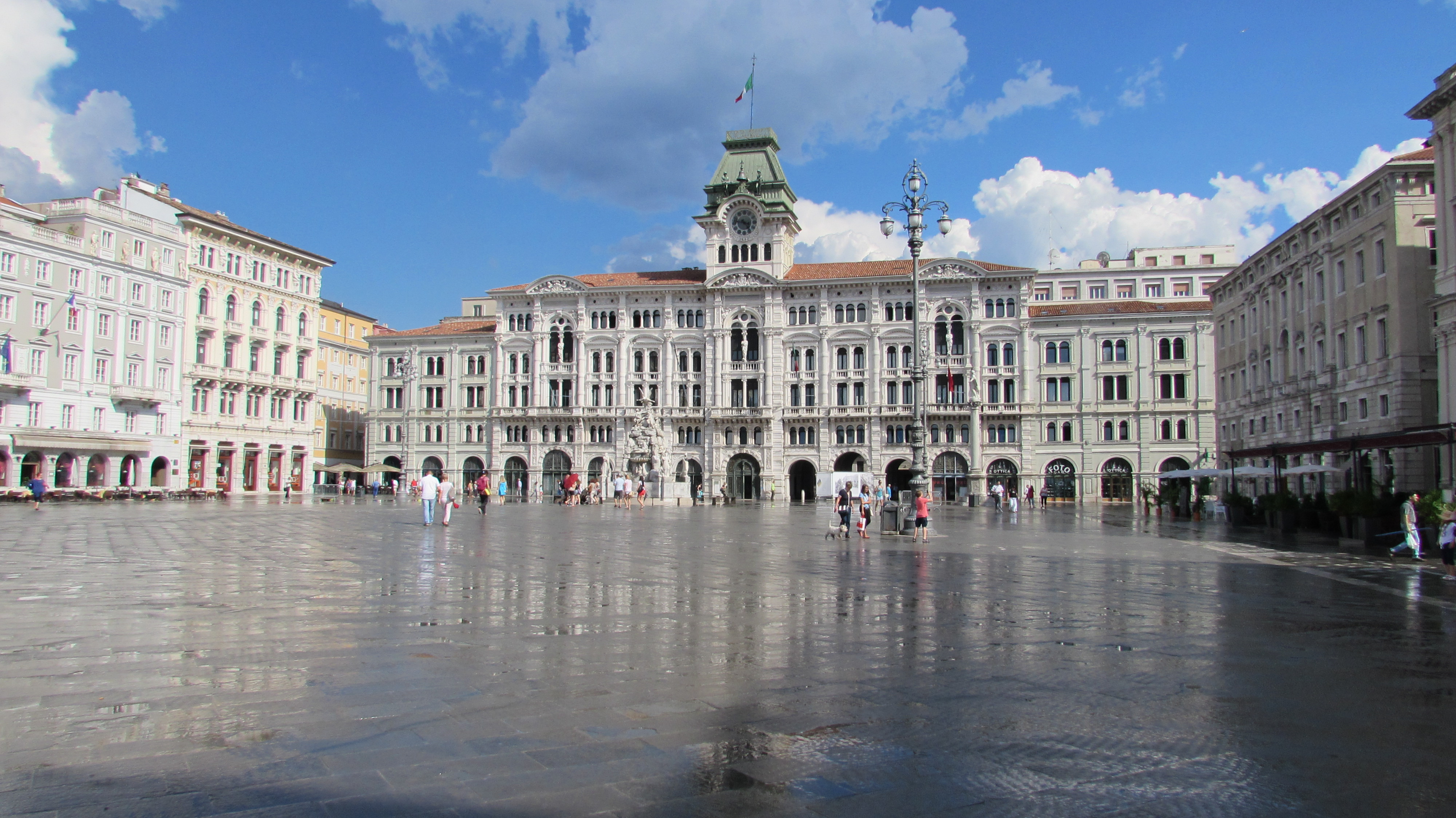 Triest Piazza dell'Unita d'Italia